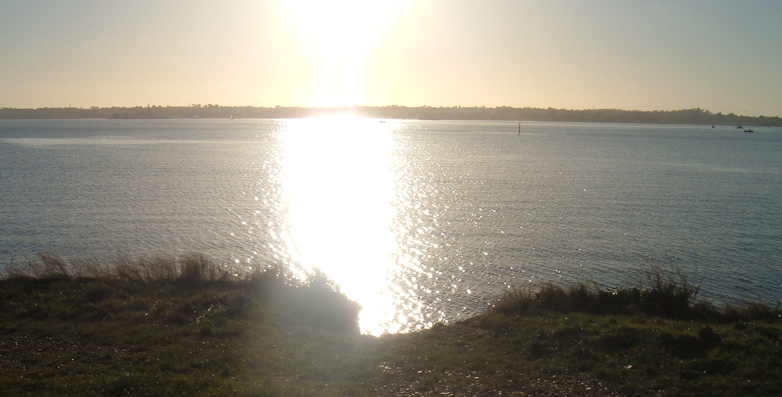 Afternoon.